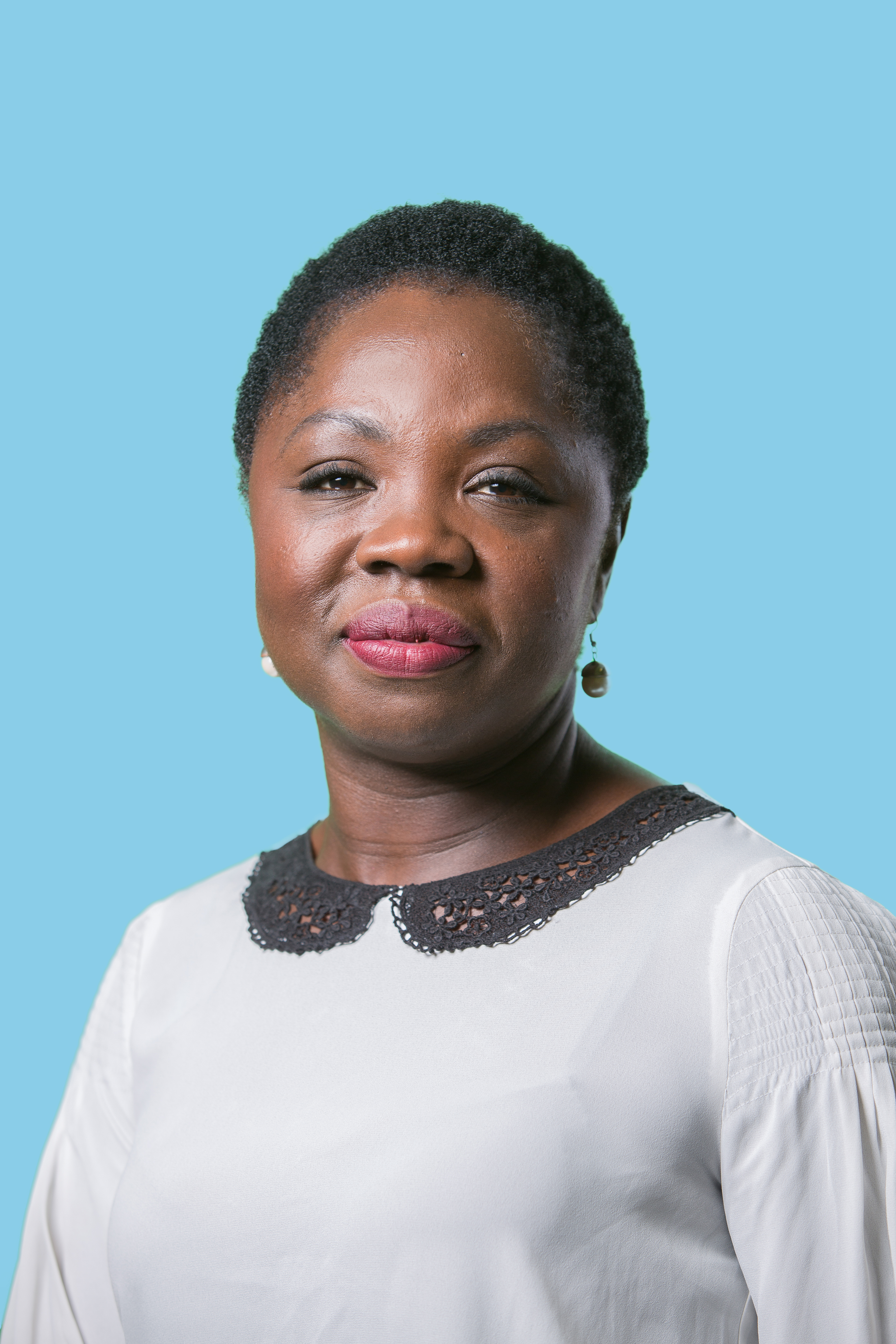 22 november 2016. Tweede Kamerlid voor de Partij van de Arbeid. Foto: Lex Draijer.